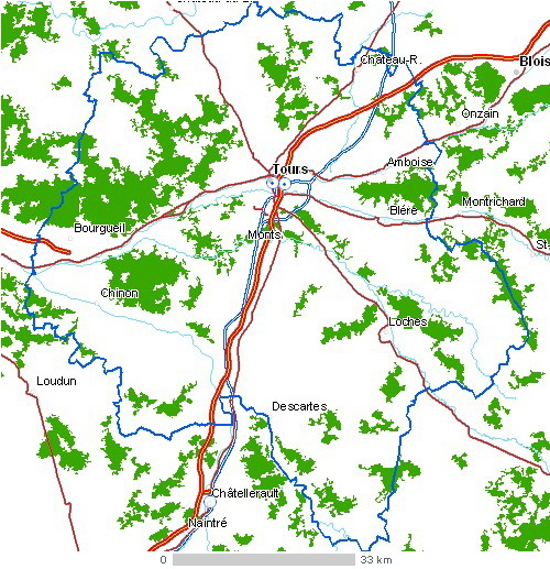 Carte routière du département d’Indre-et-Loire. Légende